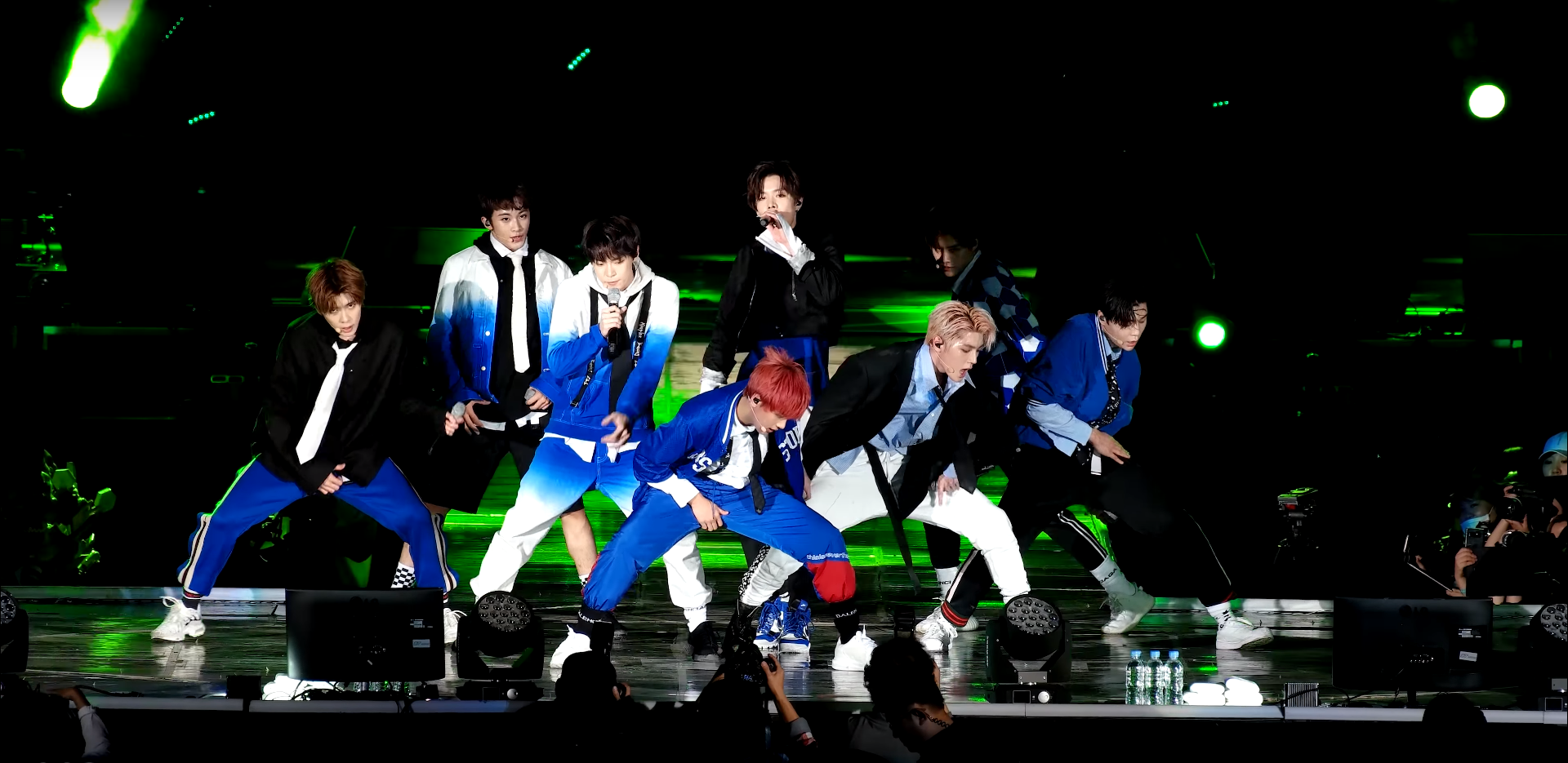 170915 롯데 면세점 패밀리 페스티벌 NCT 127 - Summer 127